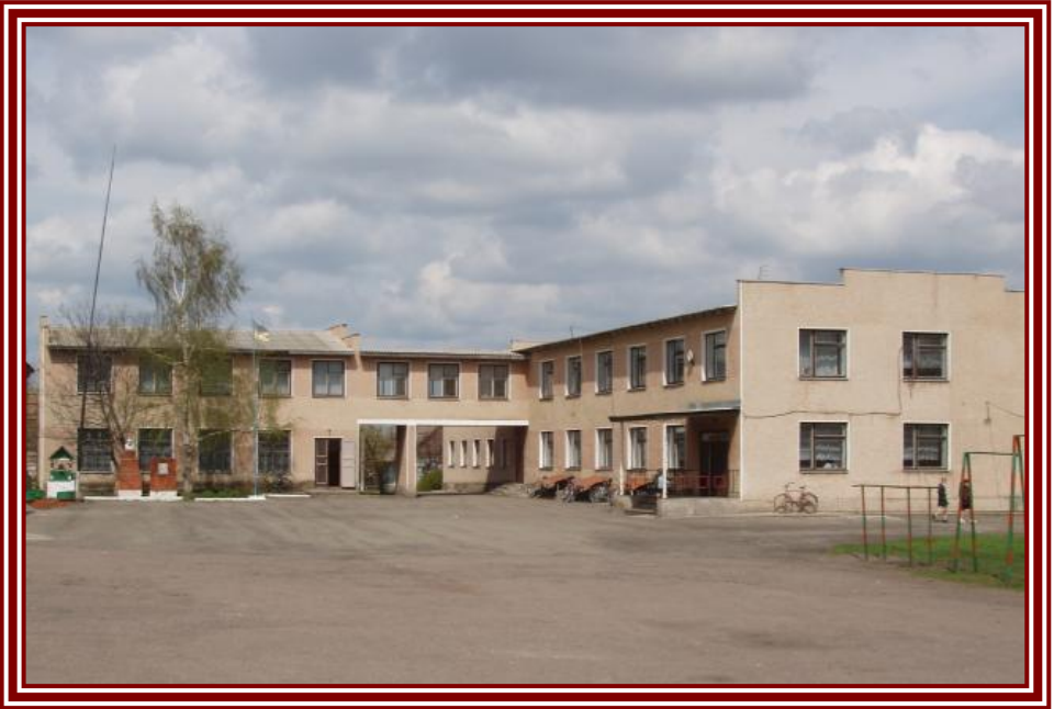 Довгоочікуване відкриття